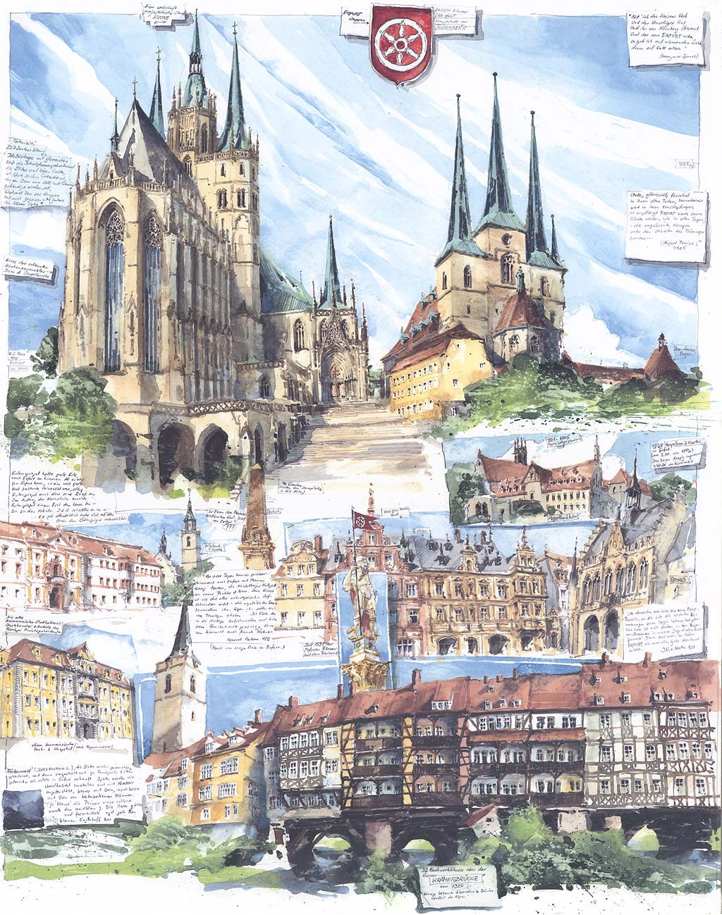 Robert C. Rore WV2558 "Erfurt", Aquarell auf Papier, 54x44cm, 1998